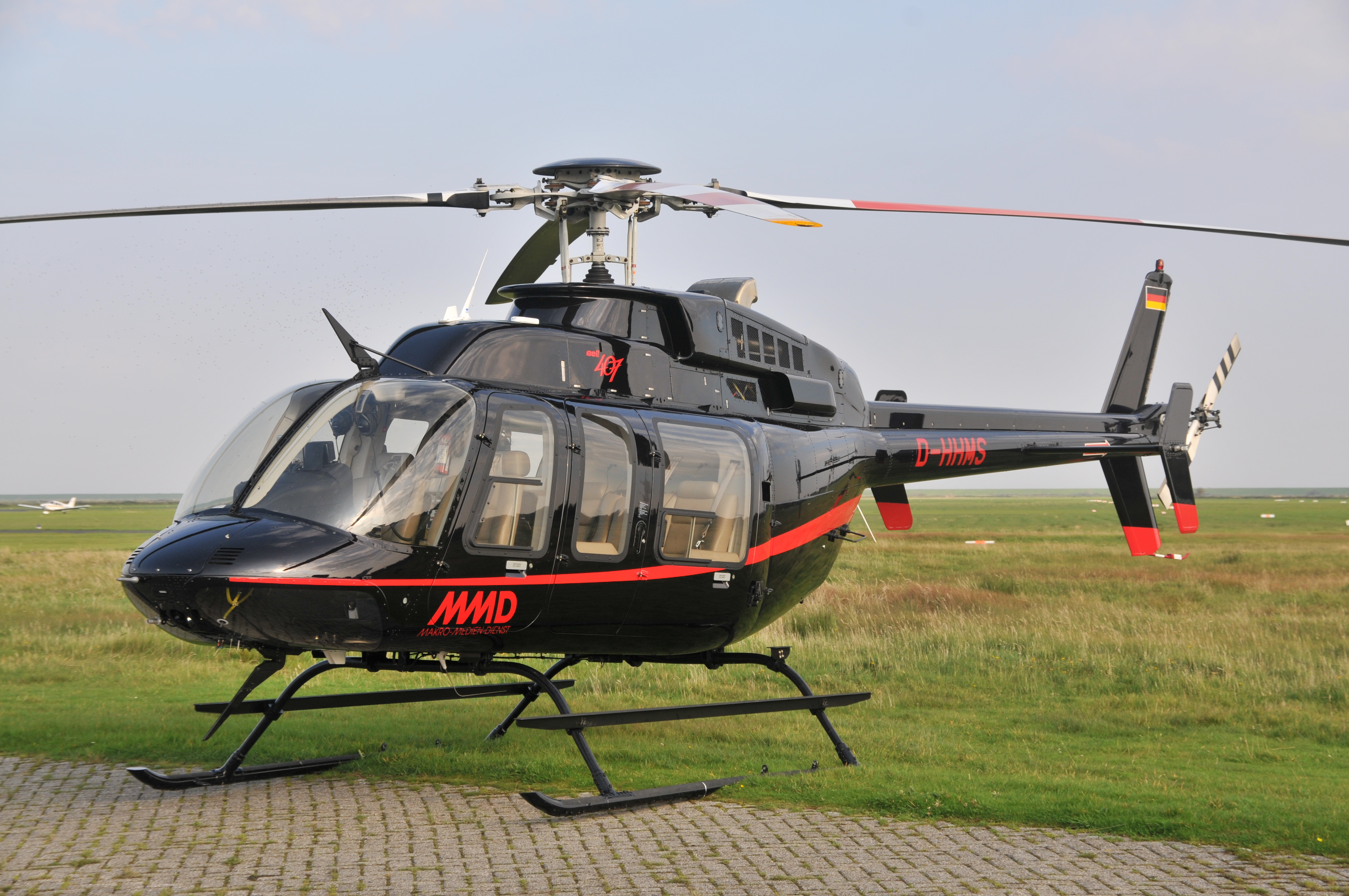 Fotoflug Nordsee; Hubschrauber Bell 407 auf dem Flugplatz Borkum